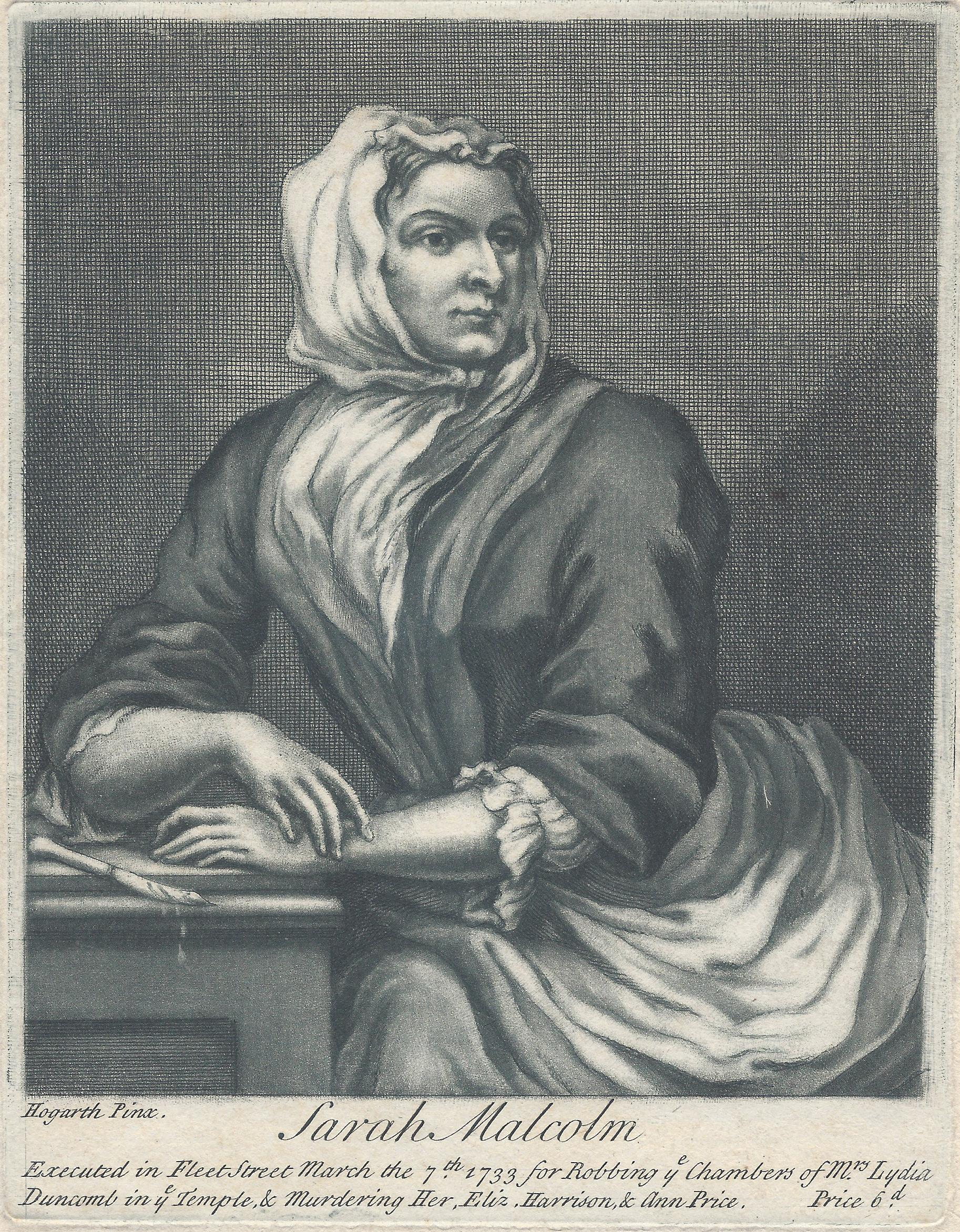 Aquatinta in Indigo mit der Darstellung der Sarah Malcolm nach William Hogarth mit der Ergänzung des bei der Tat verwendeten Messers.